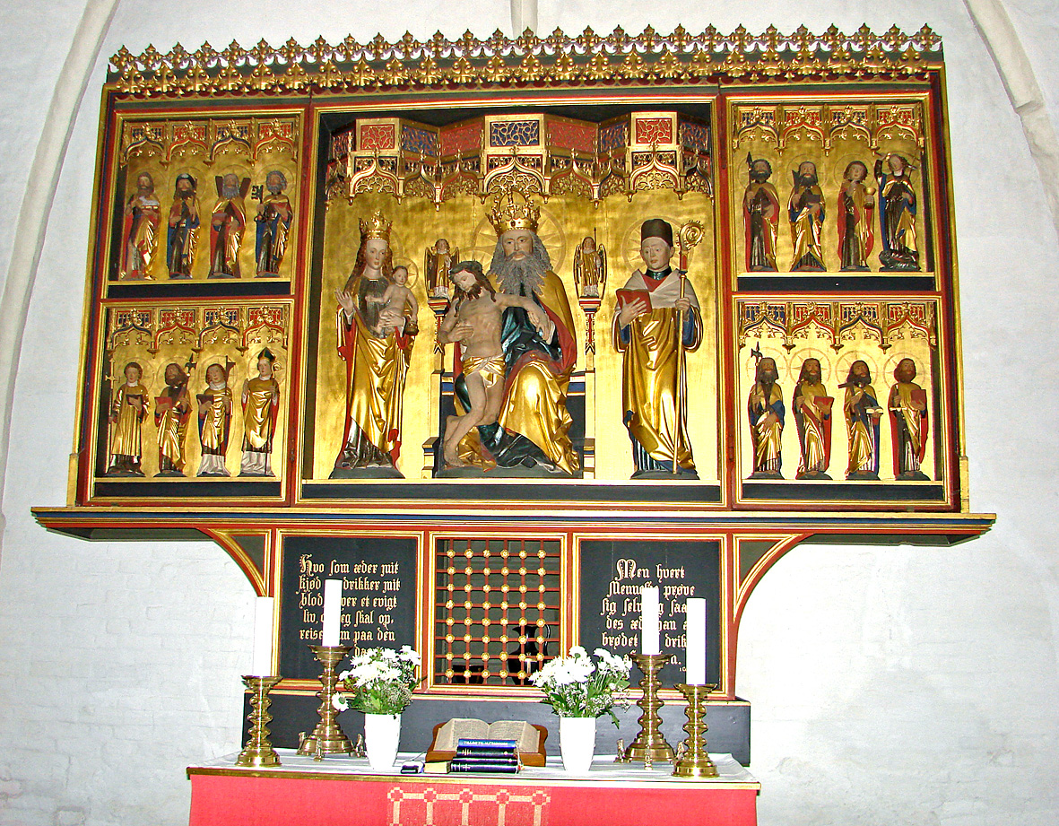 Altertavlen fra Ringkloster er nu i Østbirk Kirke da: Østbirk Kirke ligger i Voer Herred i det tidligere Skanderborg Amt i Østjylland. Kirken hørte i middelalderen under Voer Kloster men præges nu af tilhørsforholdet til slægten Skram på Urup.